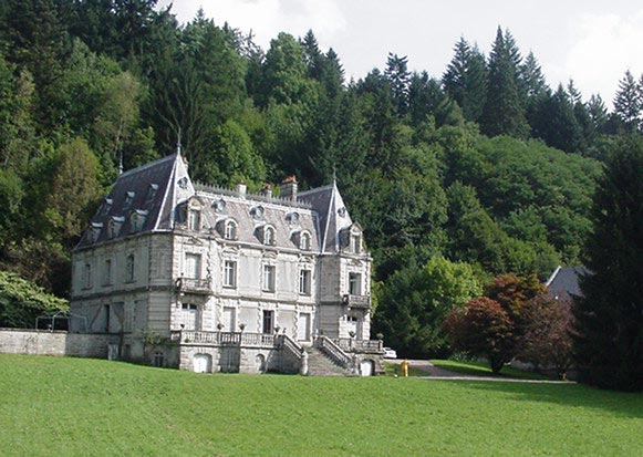 Château XIXème de Semouse